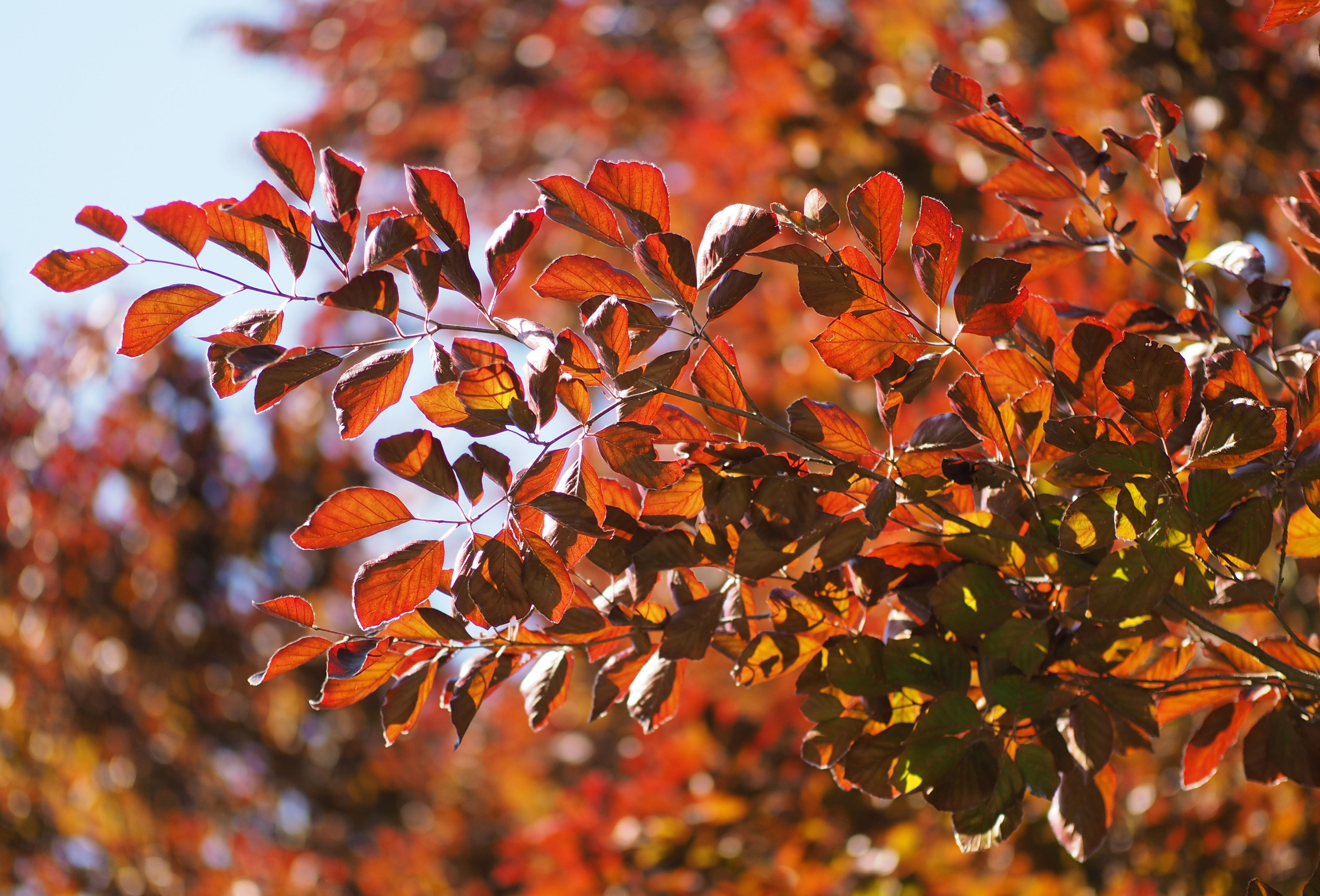 Blutbuche im Gutspark Marienfelde, Blätter von unten